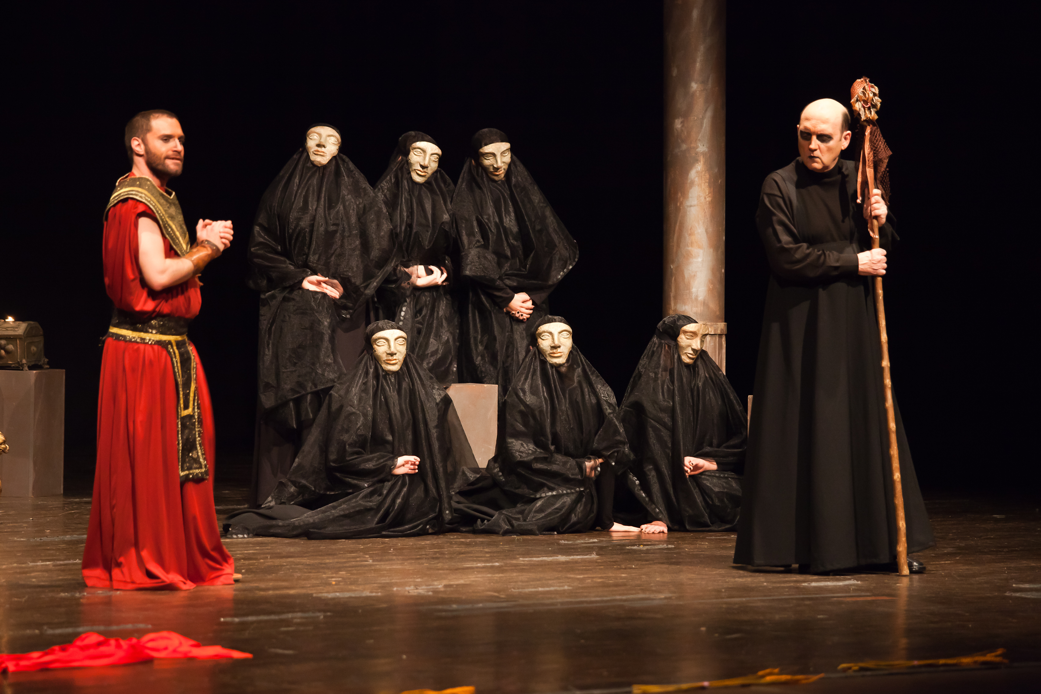 Festival de Lugo 2011 organizado por SEECGalicia. Grupo S.V. Producciones de Madrid, dirixido por Susana Verdú.